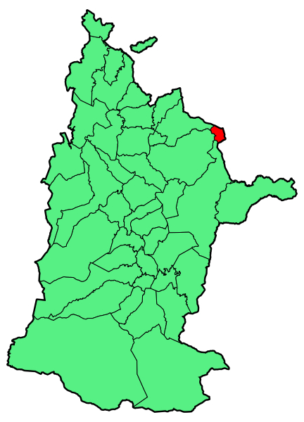 Ospitalepearen kokapena zuberoan